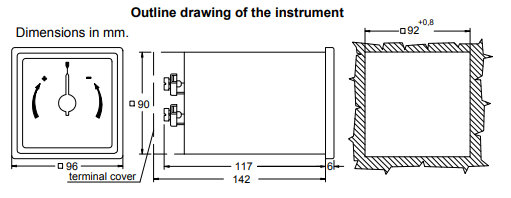 Szinkronoszkóp nézeti rajza.